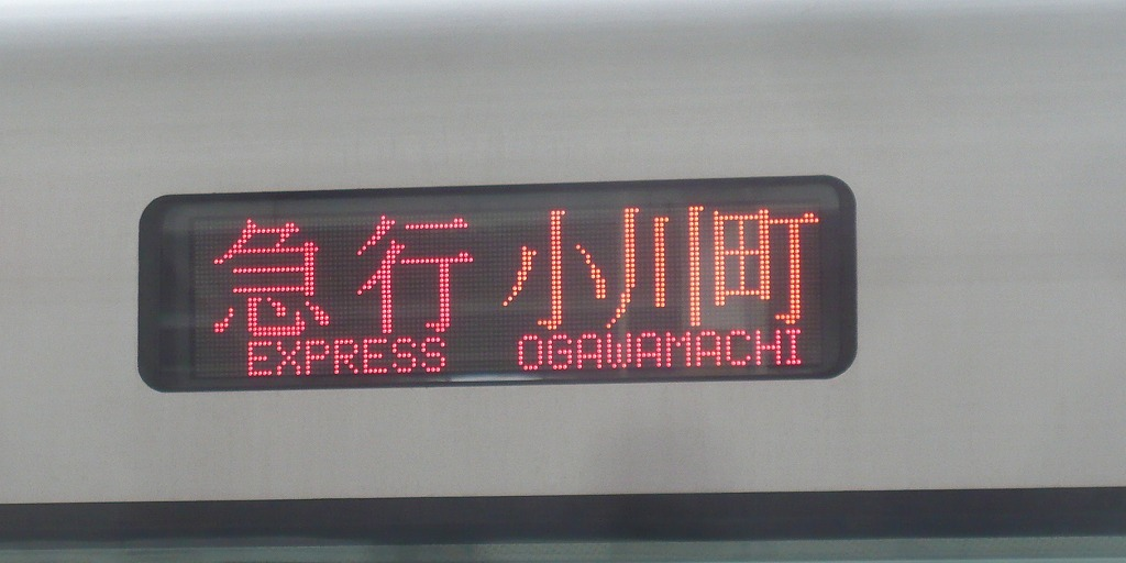 東武50000形行先表示